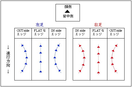 Figureskate-edge&skating-back